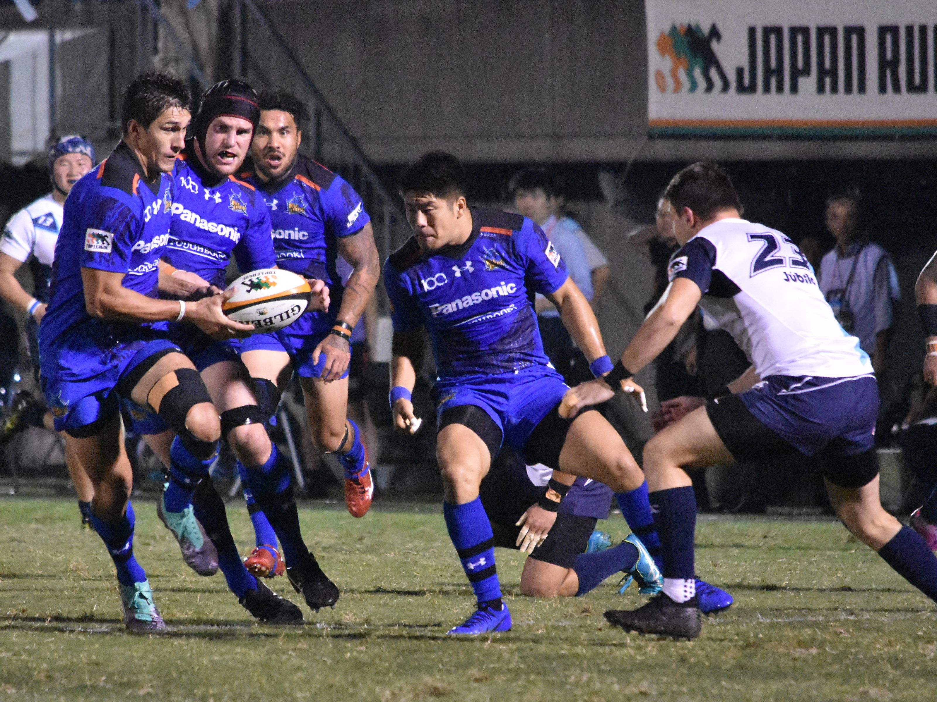 ハロルド・フォスター